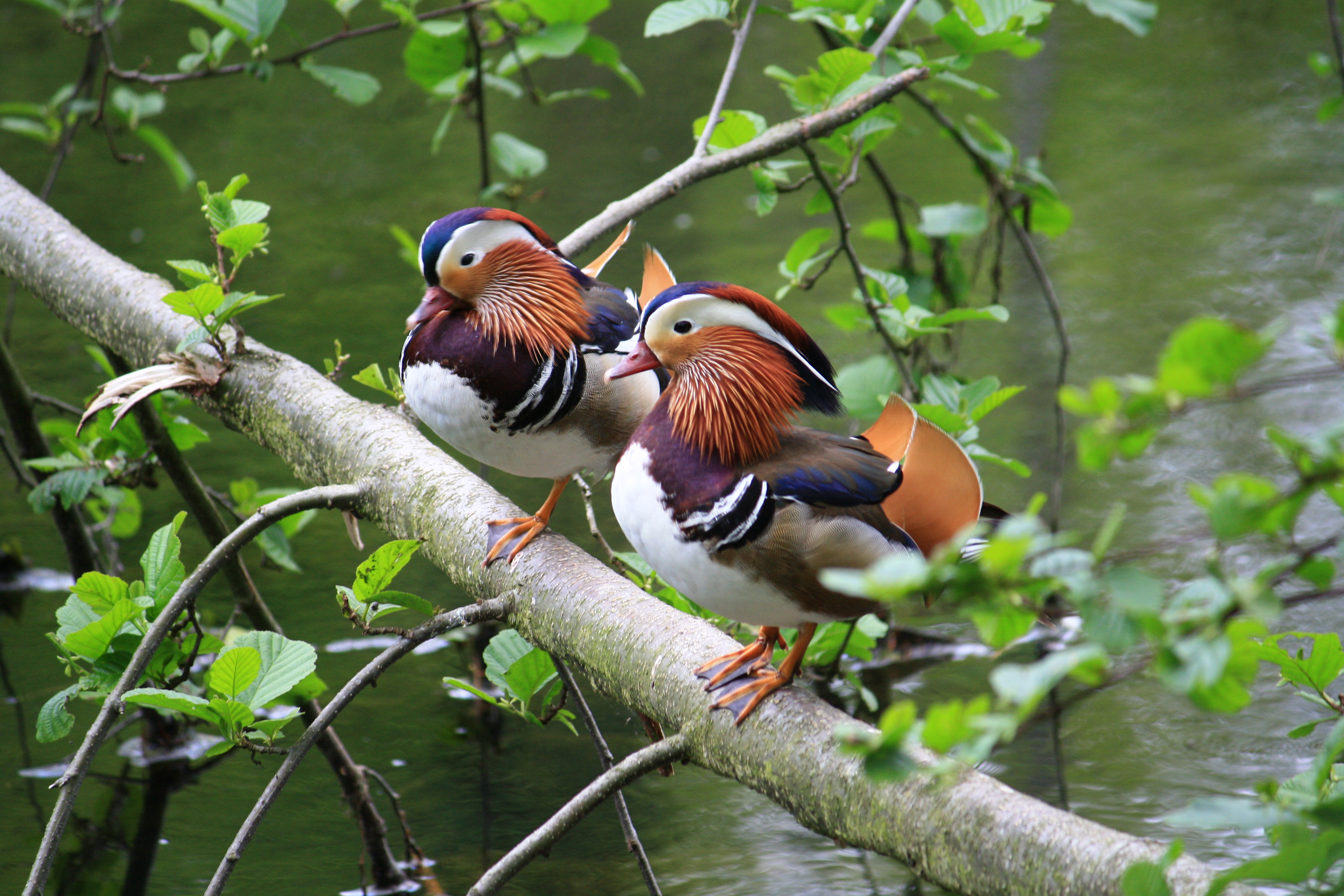 Schwarztöbeli respectiveley Schwarz between Bubikon and Rüti (Switzerland)